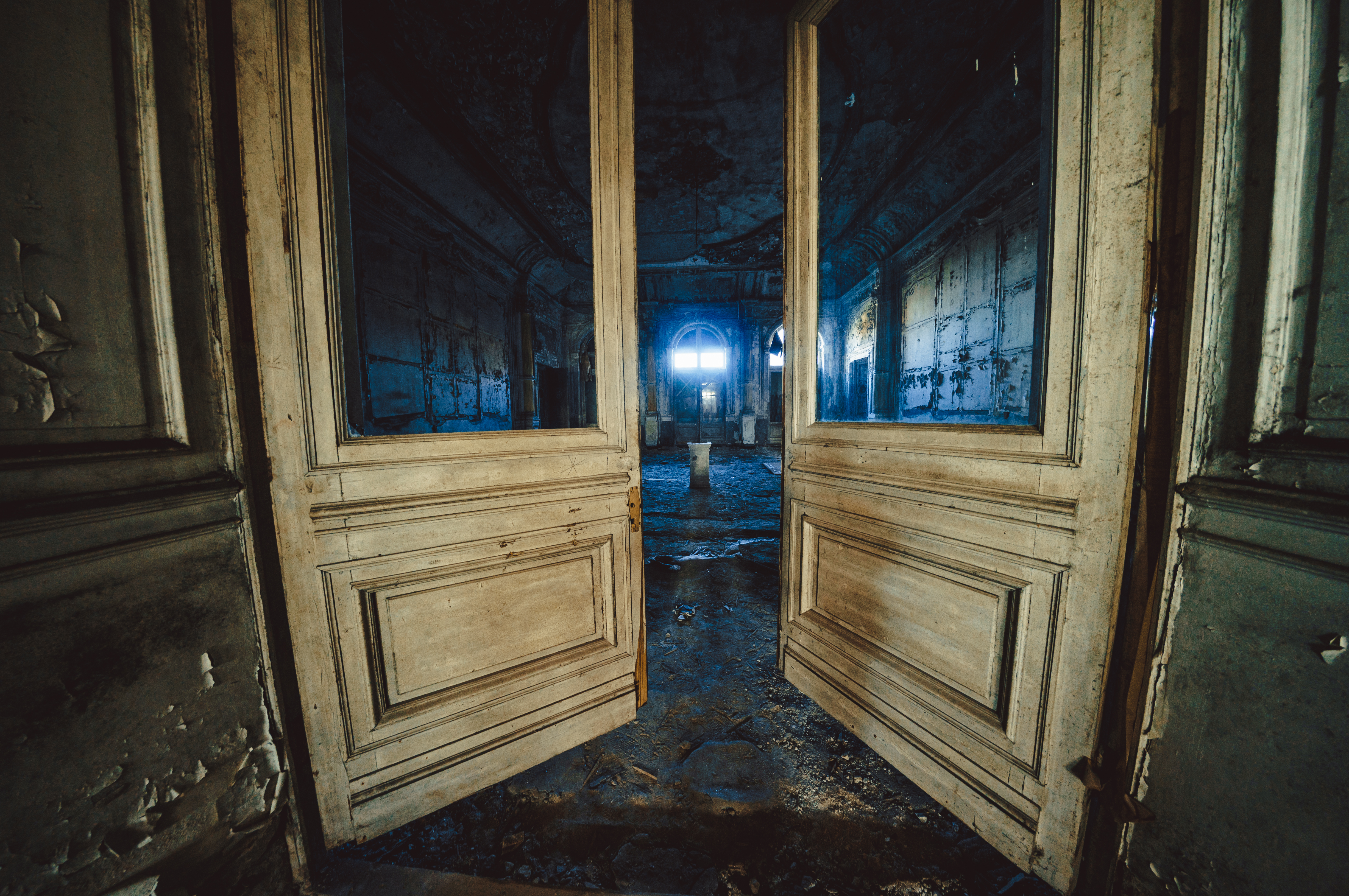 Дворец великого князя Николая Николаевича (Петергоф, Санкт-Петербургское шоссе, 115)